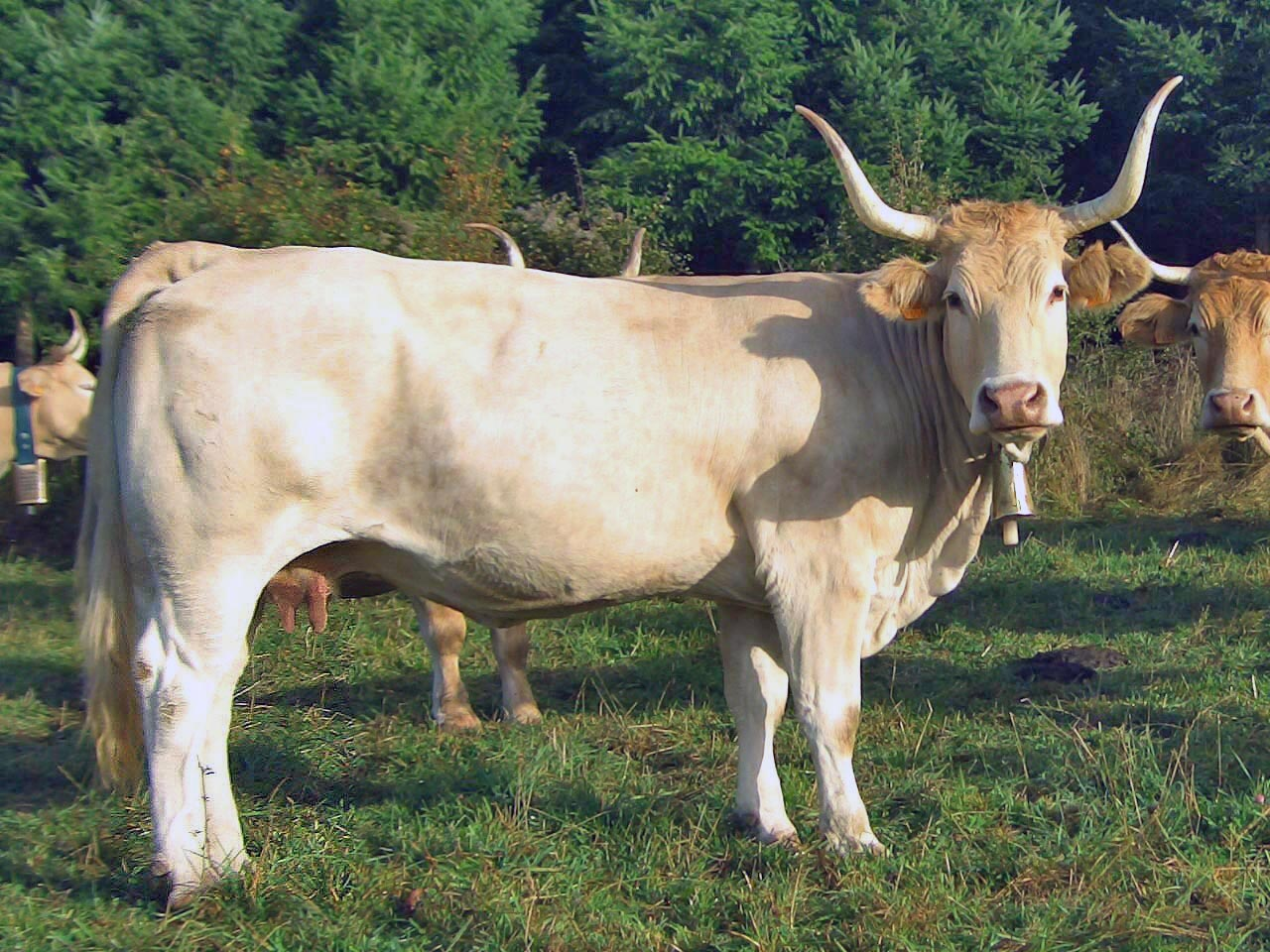 Vaca pirenaica en los pastos de montaña de Ezkaroz(Navarra)